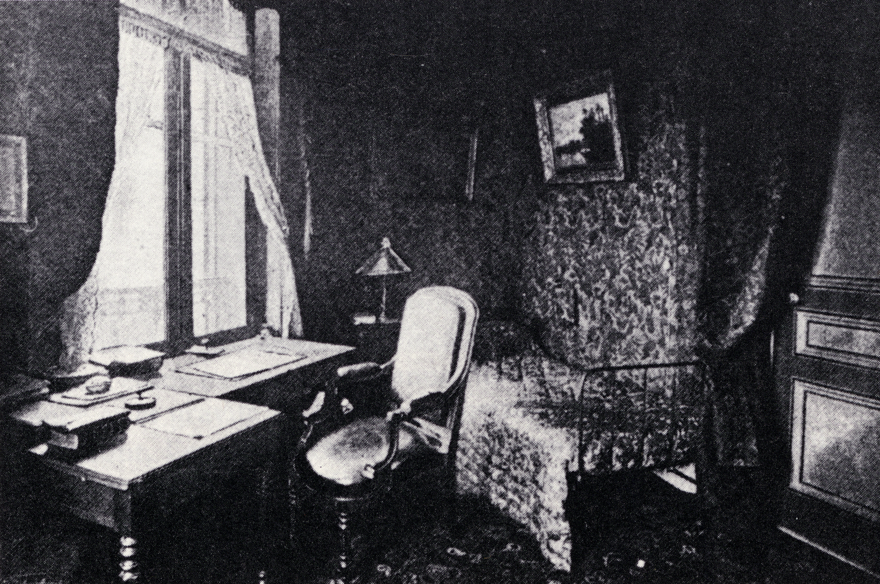 La maison du 2 rue Charles Dubois à Amiens (Somme), où Jules Verne a vécu de 1882 à 1900. Le cabinet de travail de l'écrivain situé au 2e étage.